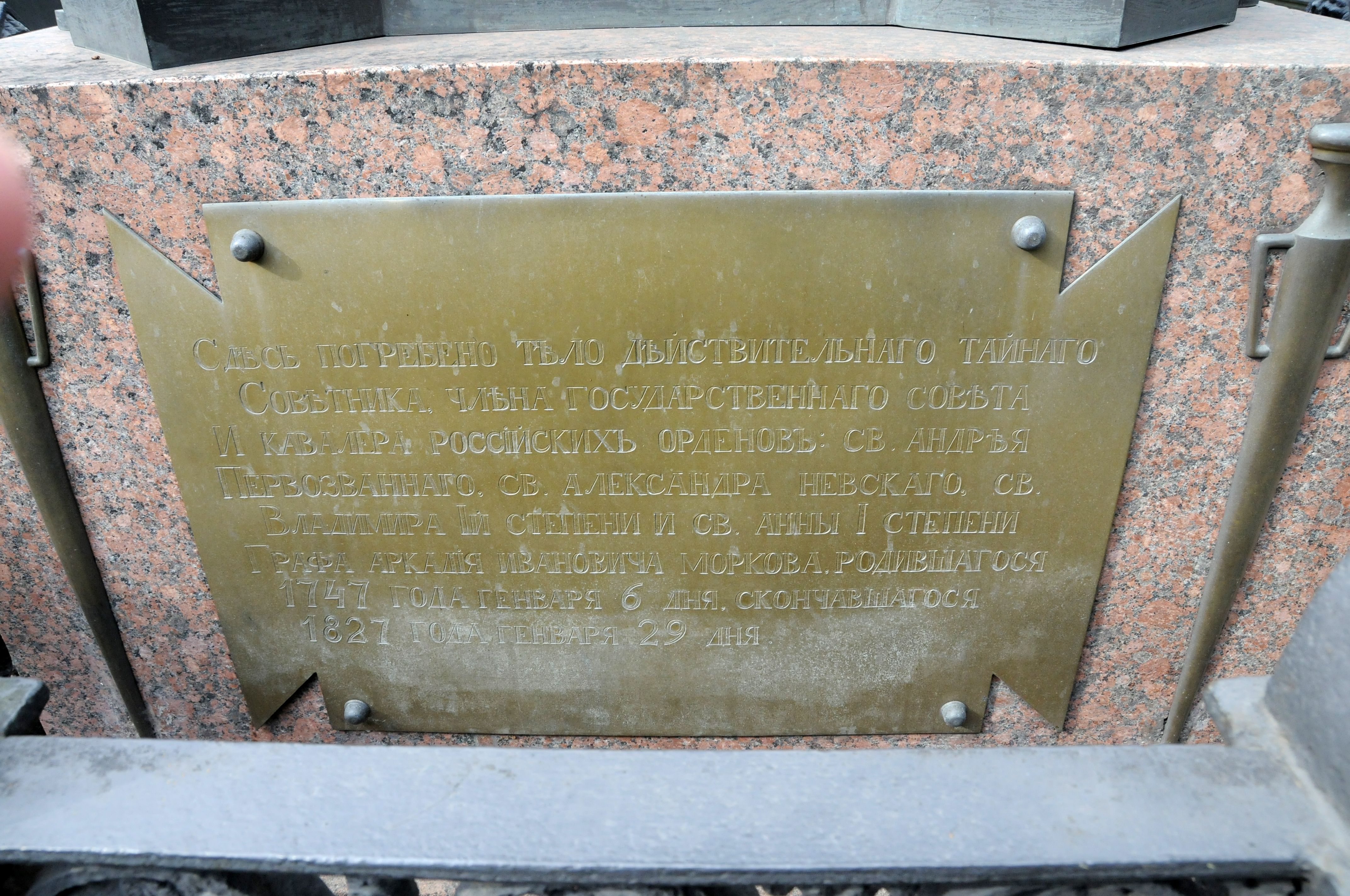 Эпитафия на надгробии Моркова Аркадия Ивановича на Лазаревском кладбище Александро-Невской лавры